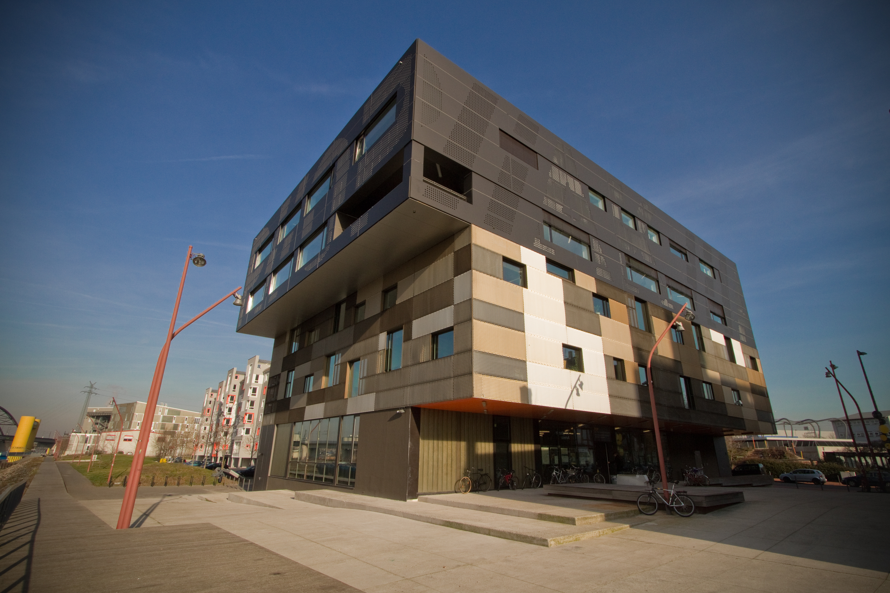 Das Popakademie-Gebäude nach der Aufstockung.